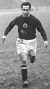 Title: FDGB-Pokal, Vorwärts Berlin - Wismut Karl-Marx-Stadt 2:0 Factual corrections and alternative descriptions are encouraged separately from the original description. Additionally errors can be reported at this page to inform the Bundesarchiv. Original historic description: ADN-ZB-Bey-Wen. Mü. 9.12.1956 Vorwärts erreichte Pokalendspiel - Am Sonntag, dem 9.12.1956, standen sich im Berliner Jahn-Stadion im FDGB-Vorschlussrundenspiel der Fußballer die Mannschaften von Vorwärts Berlin und Wismut Karl-Marx-Stadt gegenüber. Durch einen 2:0 Sieg erkämpfte sich die Berliner Mannschaft den Einzug in das Finale. UBz: In diesem Augenblick fiel das 1:0. Assmy (links) schob den Ball überlegt am Torwart vorbei zum ersten Treffer ein. Der Wismutverteidiger Bauer (rechts) kam zu spät, um eingreifen zu können.